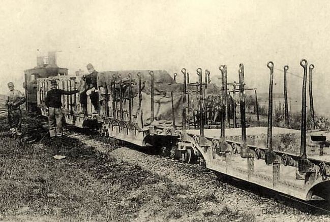 Bruley (Meurthe-et-Moselle)